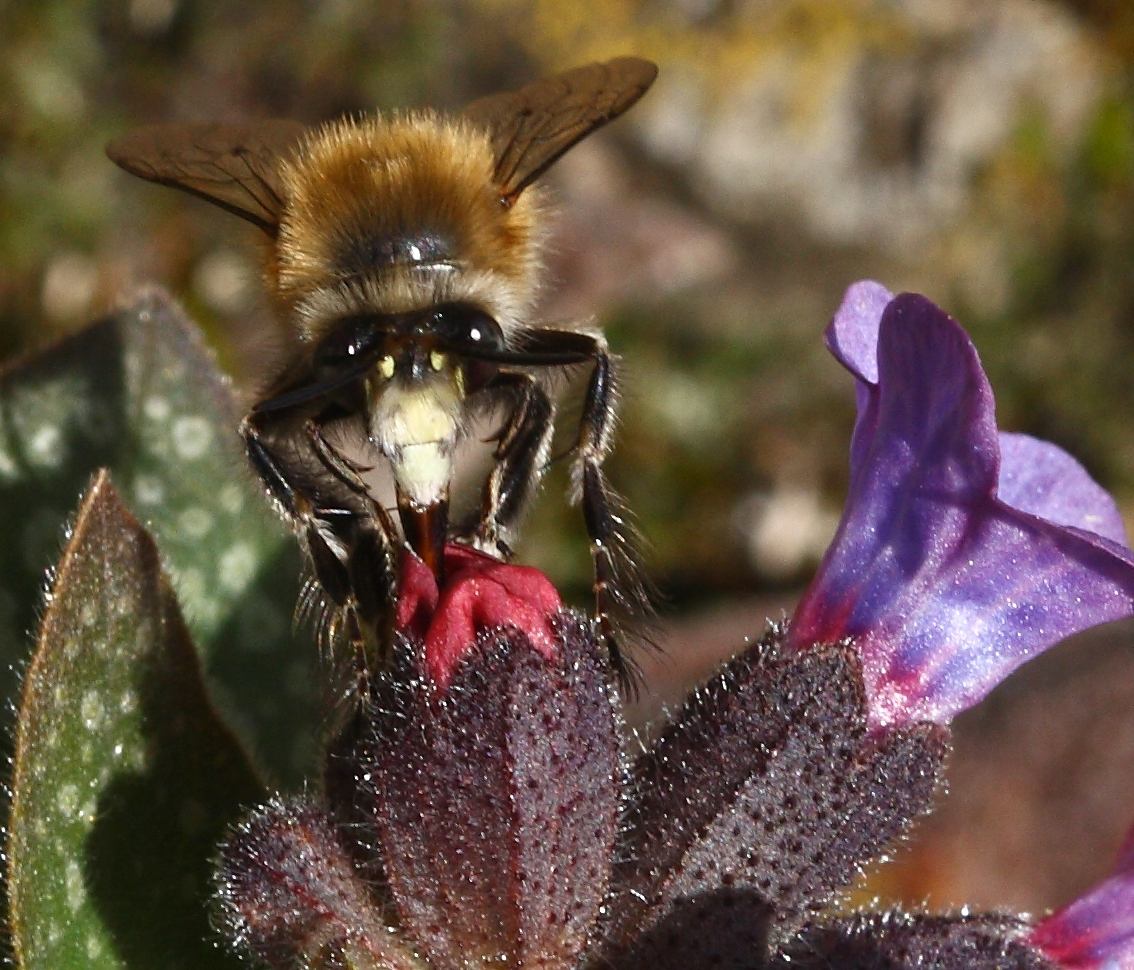 Pelzbiene auf Lungenkraut